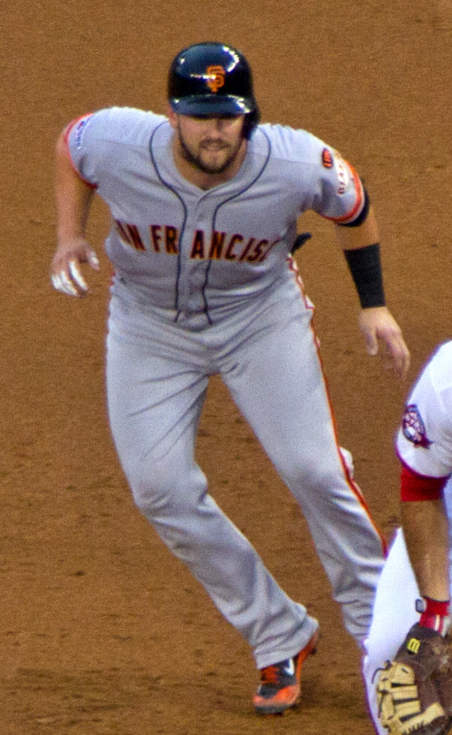 Andrew Susac